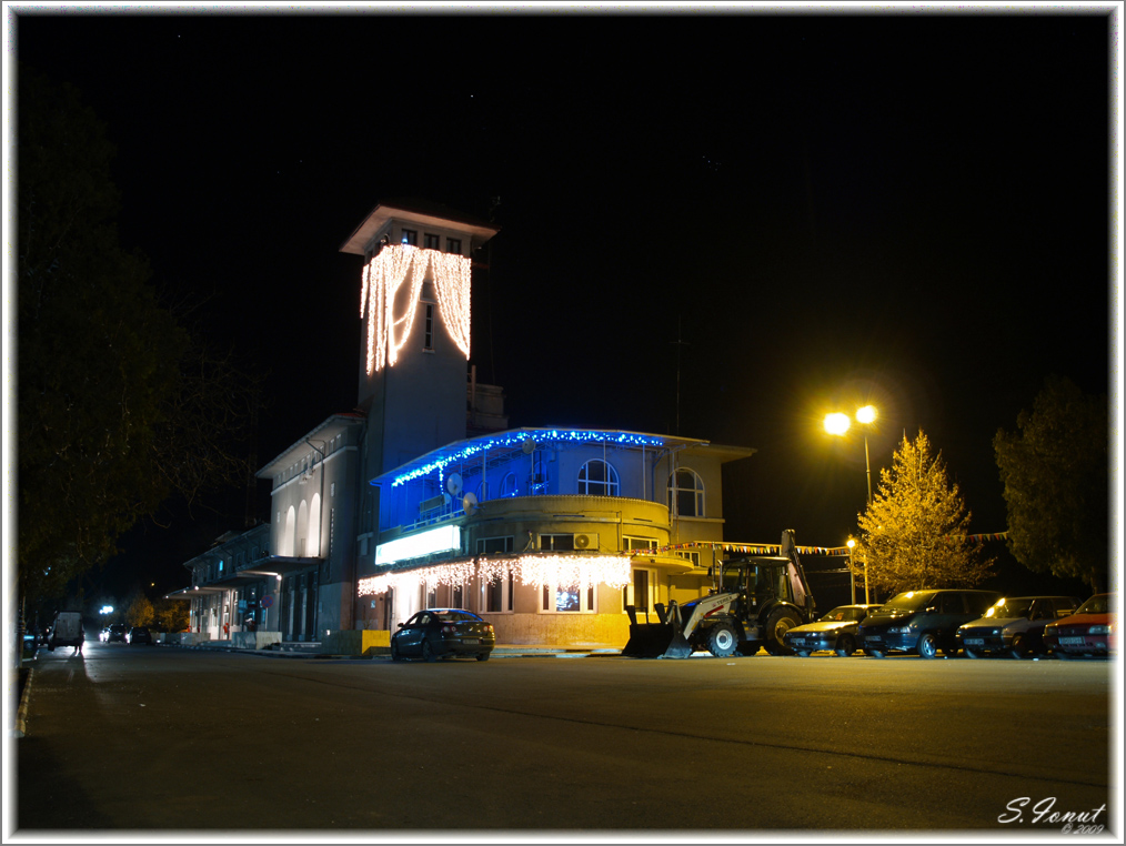 Imagine din Portul Giurgiu.